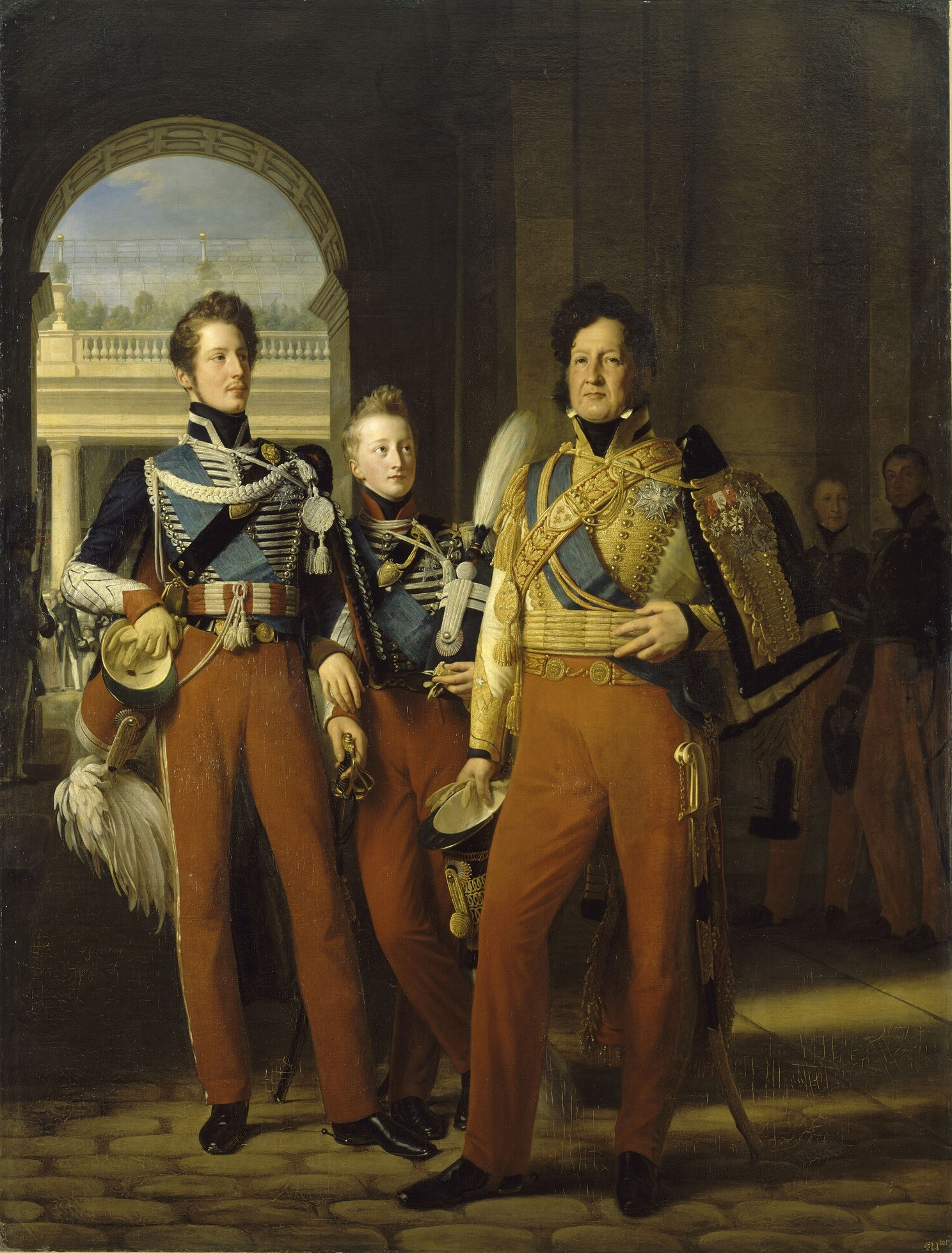 Portraits en pied de Louis-Philippe, duc d'Orléans en uniforme de colonel-général des Hussards, et de ses fils : le duc de Chartres et le duc de Nemours